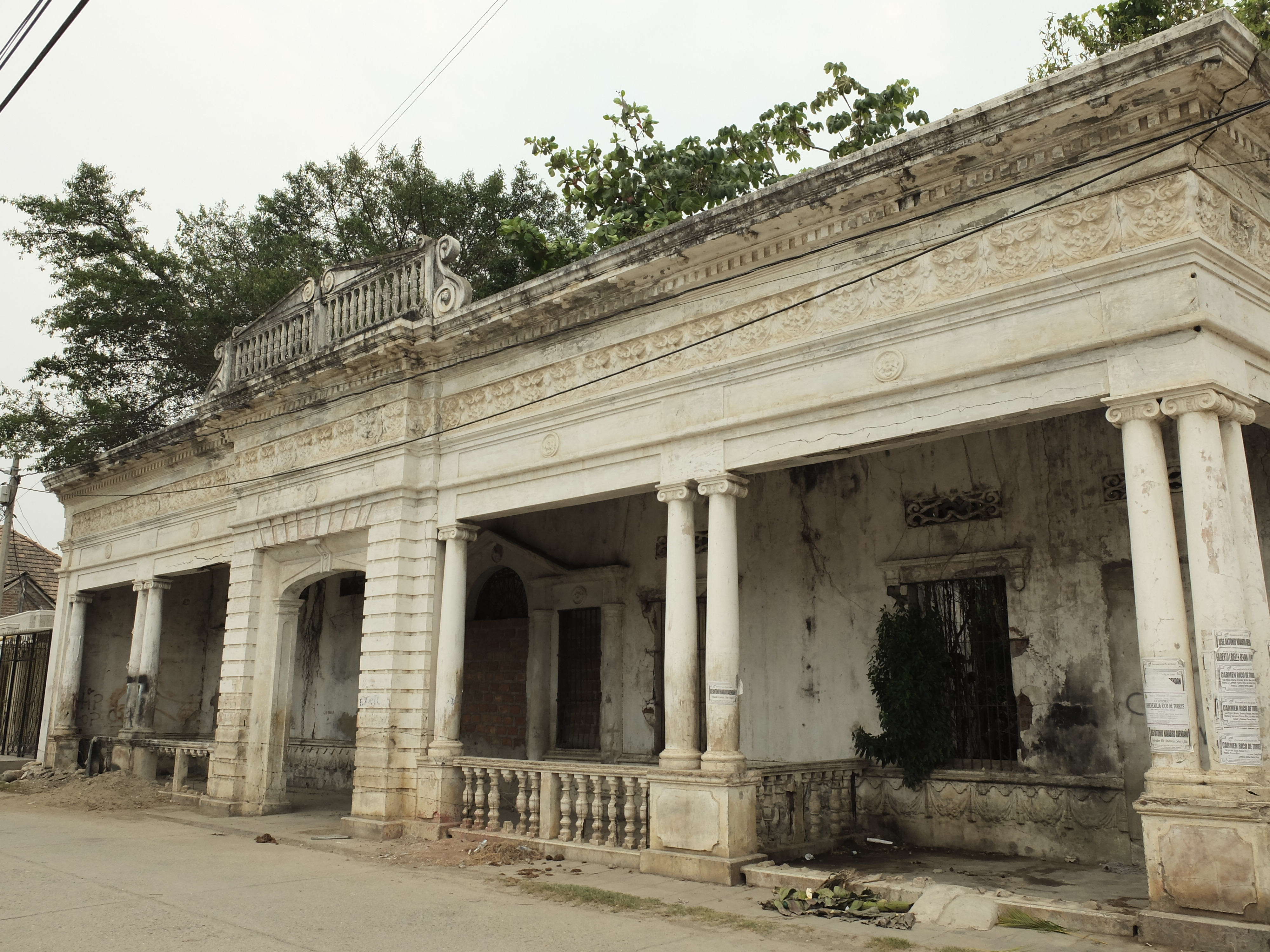 Casa del diablo en Cienaga Colombia